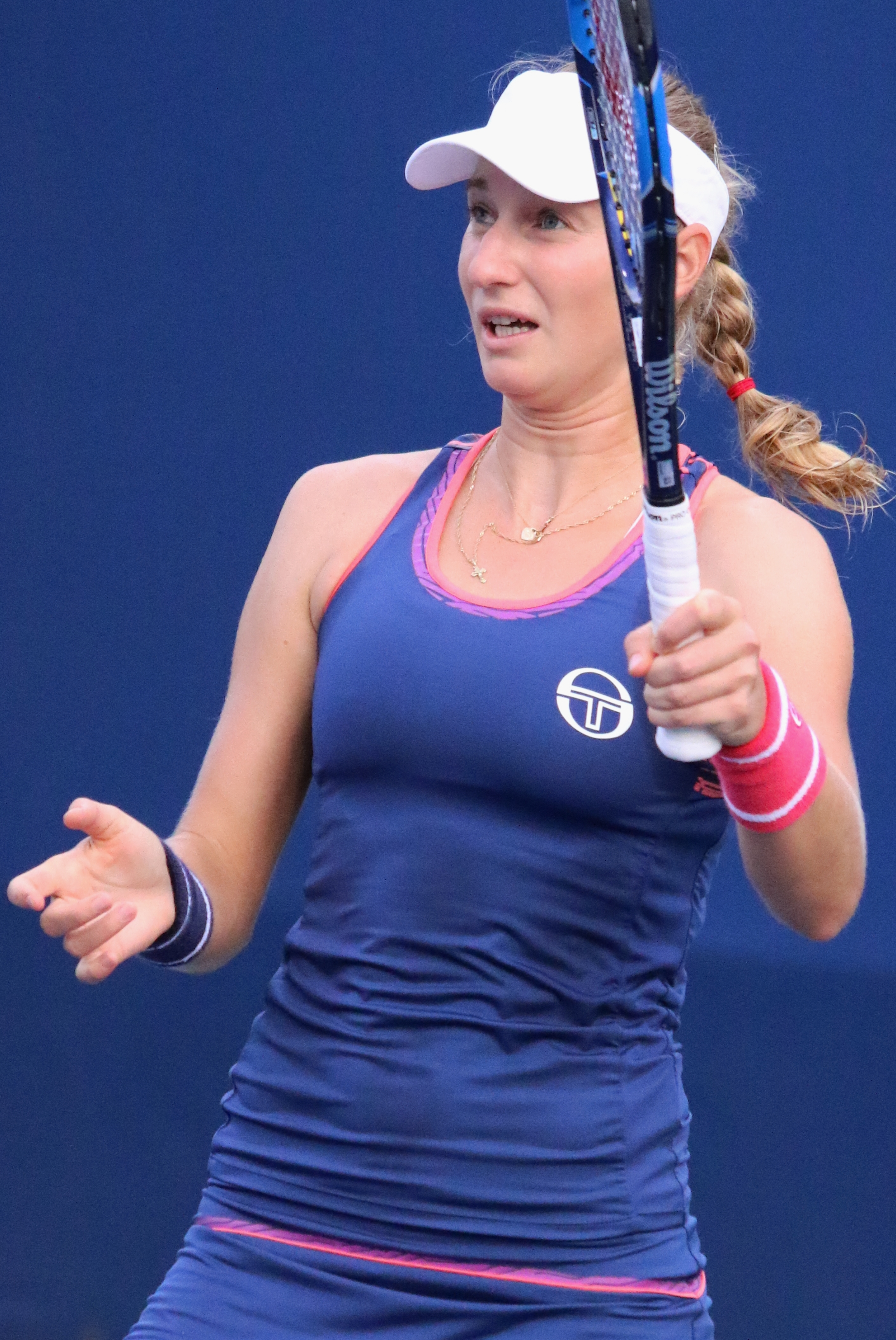 Makarova US16 (10)